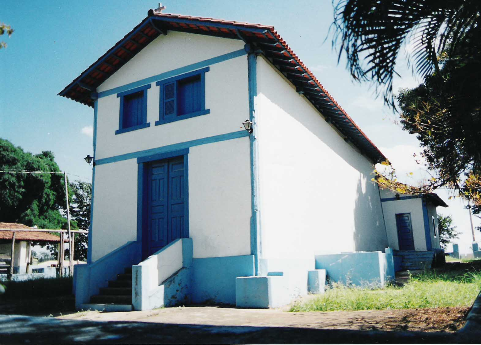 Capela de Nossa Senhora de Sant'ana - Lagoa Santa/MG (Fonte:Prefeitura Municipal de Lagoa Santa)